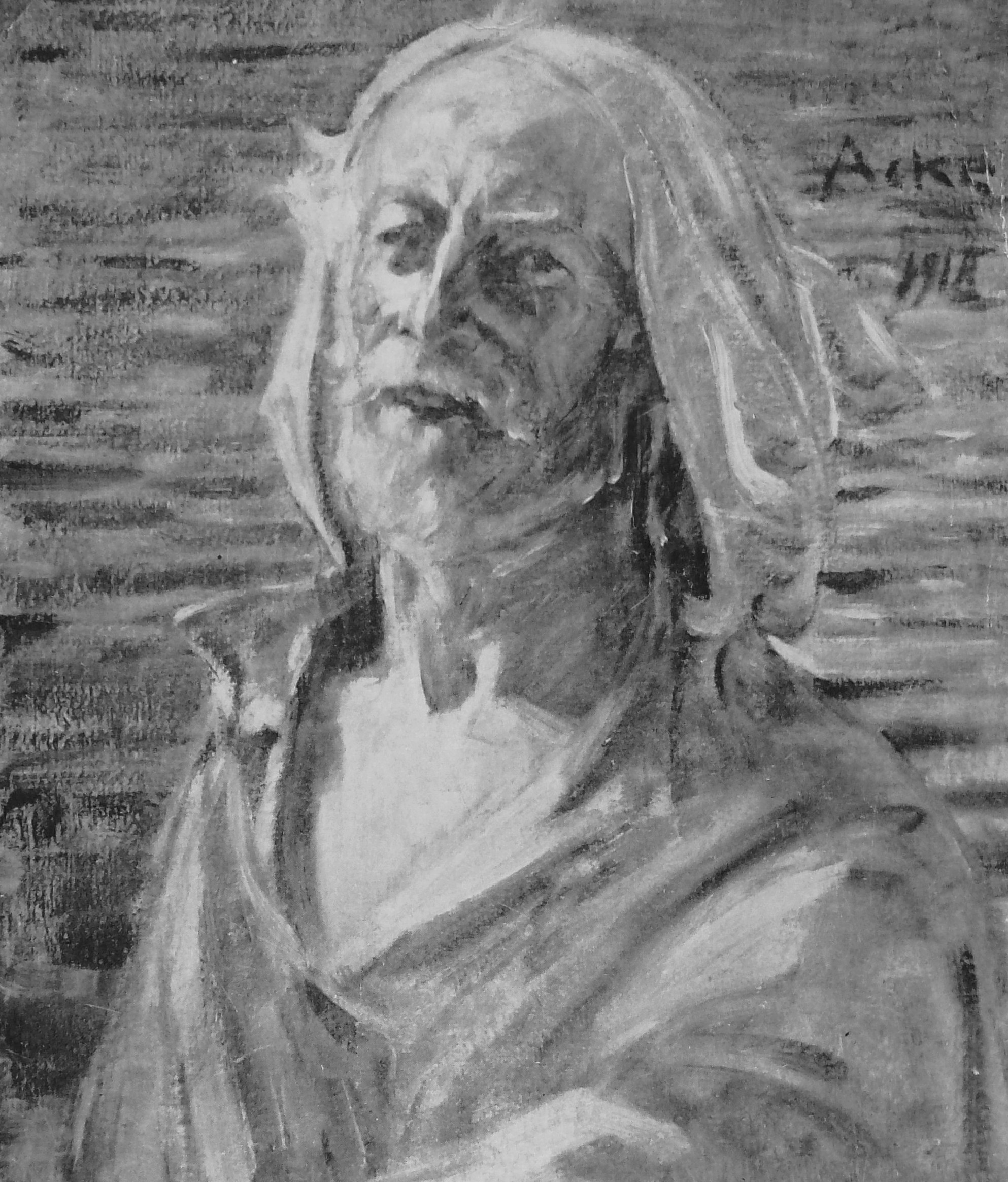 Konstnären Johan Axel Gustaf Acke, självporträtt